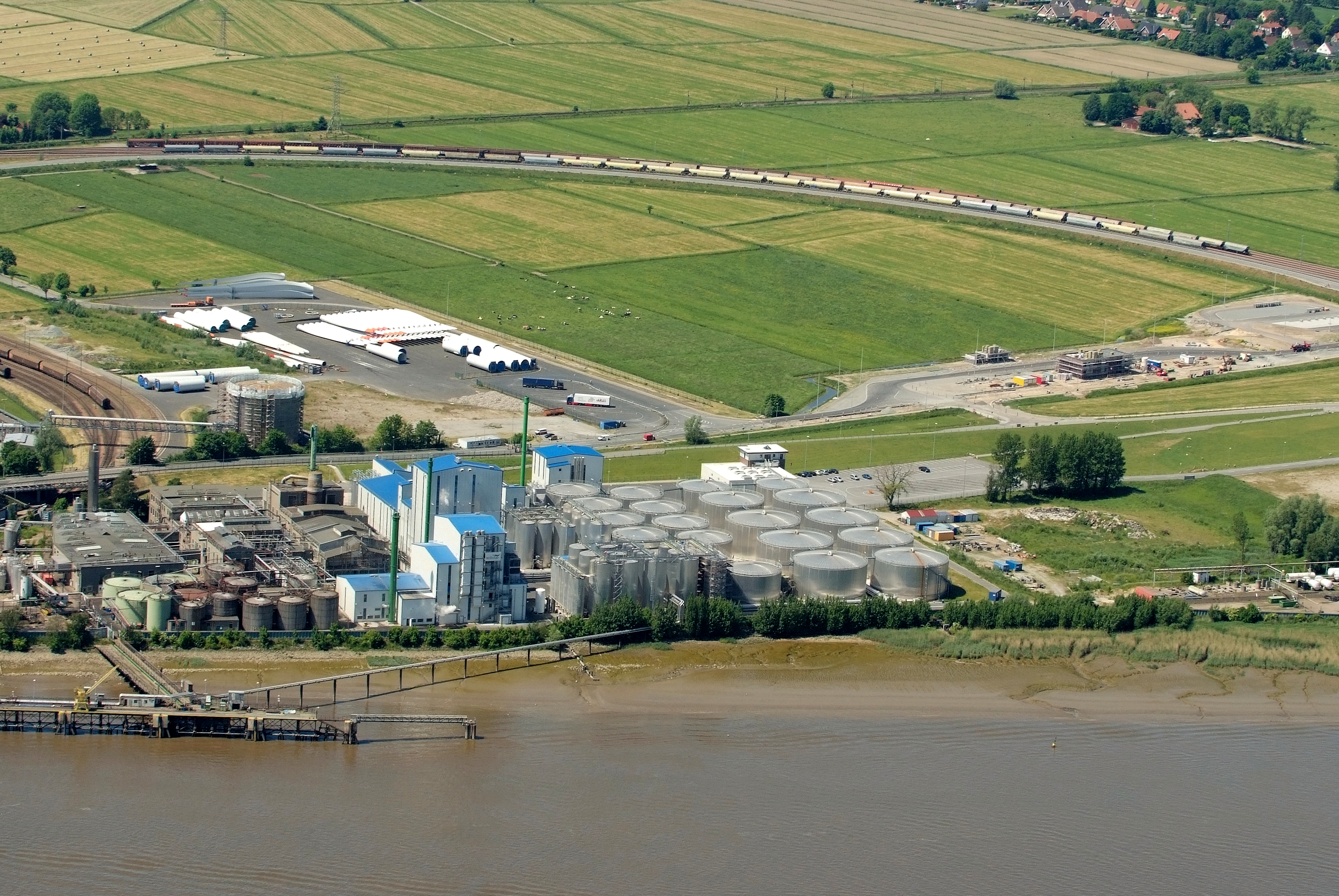 Fettraffinerie Wilmar Edible Oils GmbH, Brake (Unterweser) Fotoflug vom Flugplatz Nordholz-Spieka über Cuxhaven und Wilhelmshaven